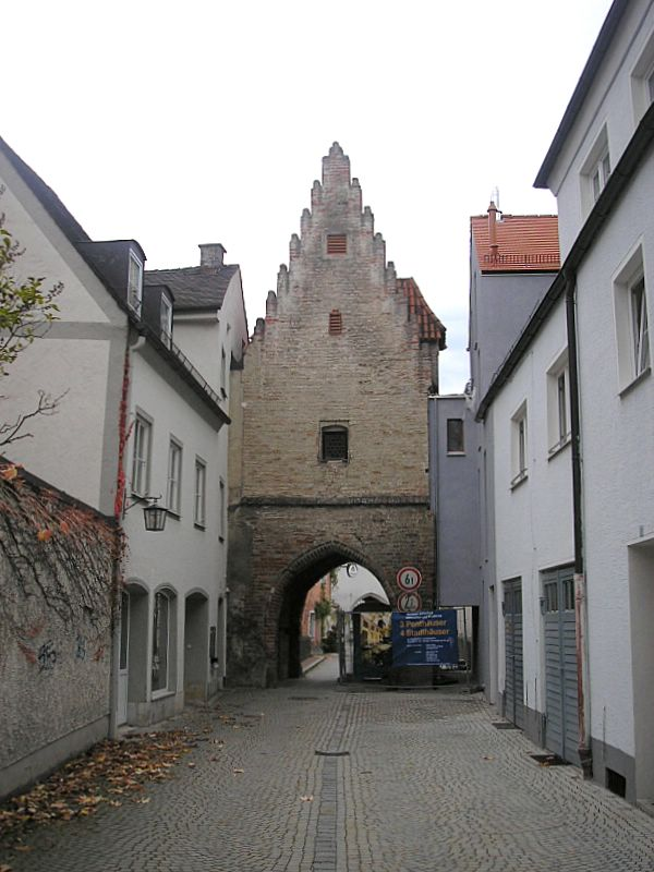 Landsberg am Lech (Oberbayern). Das „Bäckertor“ von Osten. Eigene Aufnahme, Okt. 2006 / Landsberg am Lech (Upper Bavaria, Germany). The “Baeckertor” gate, looking west. Own photo, Oct. 2006.